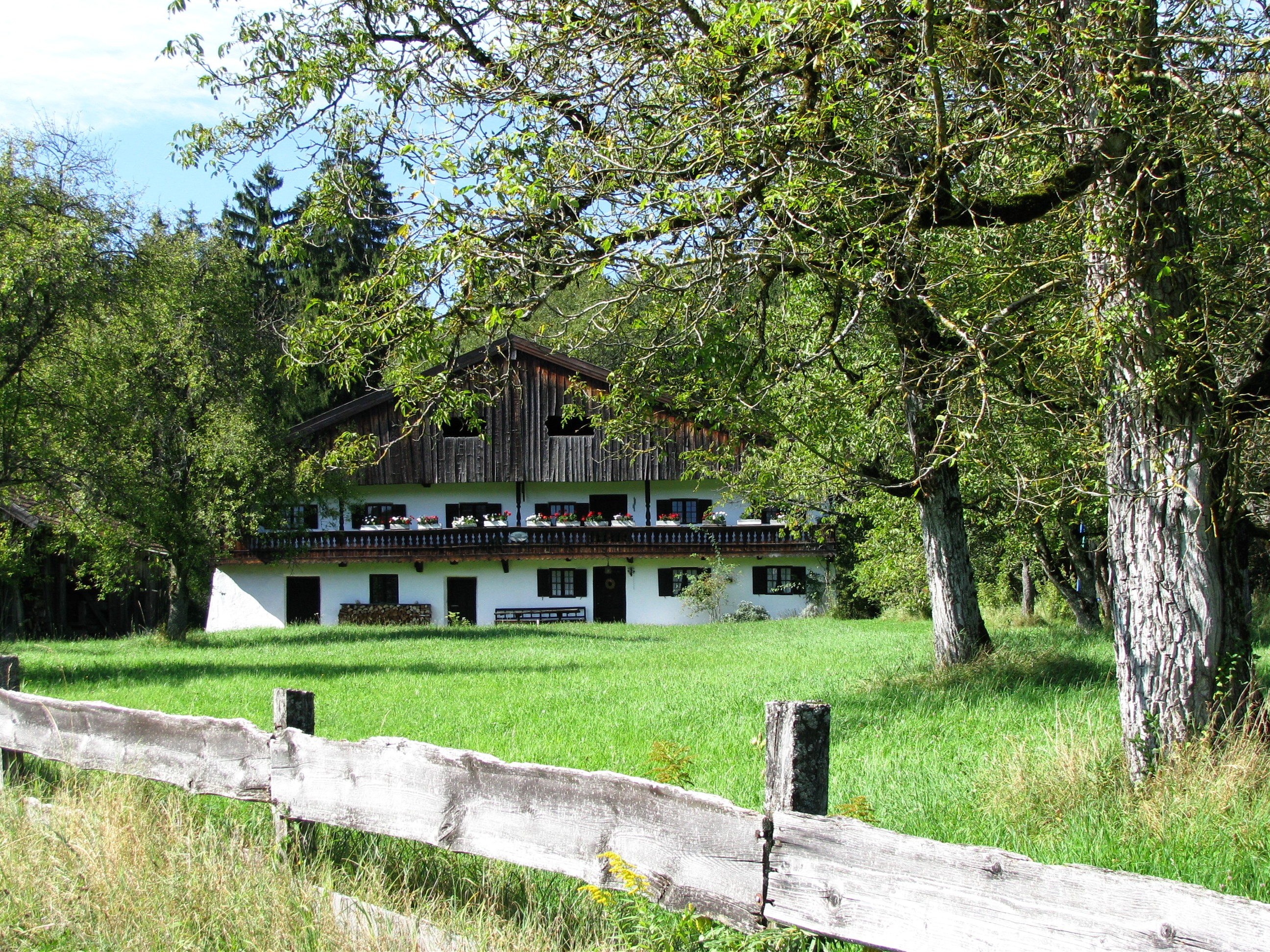 Ehem. Bauernhaus in Schallenkam, Gemeinde Münsing; zweigeschossiger verputzter Flachsatteldach-Blockbau mit Laube, verschaltem Vordach und giebelseitigem ehem. Stallteil, im Kern 2. Hälfte 17. Jh., rückseitiger Wirtschaftsteil abgegangen This is a photograph of an architectural monument.